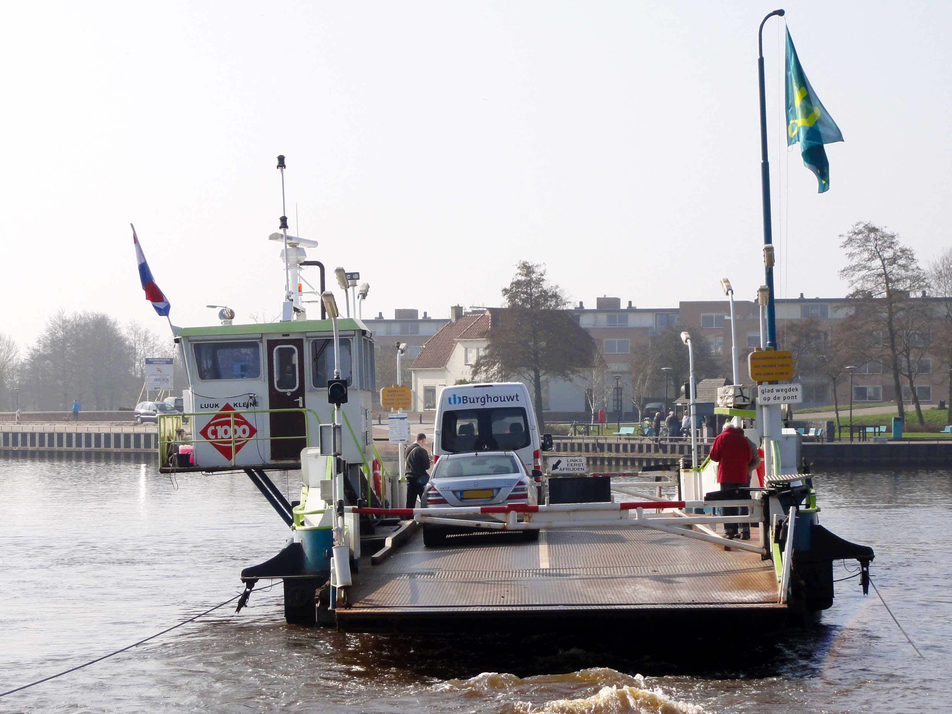 Veer bij Genemuiden over het Zwarte Water